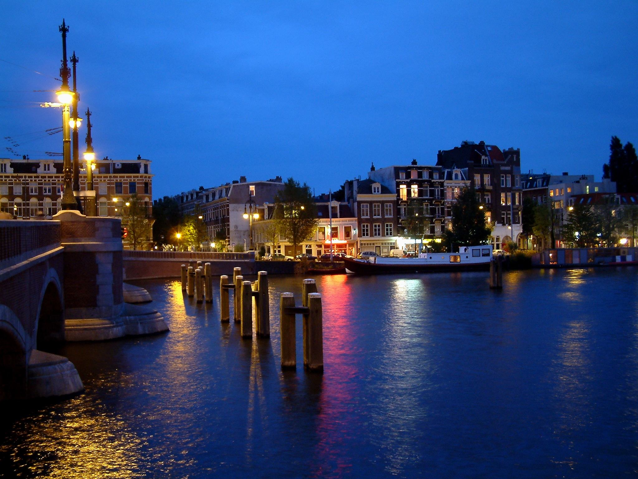 Amsterdam Autor: Melanie Schloß